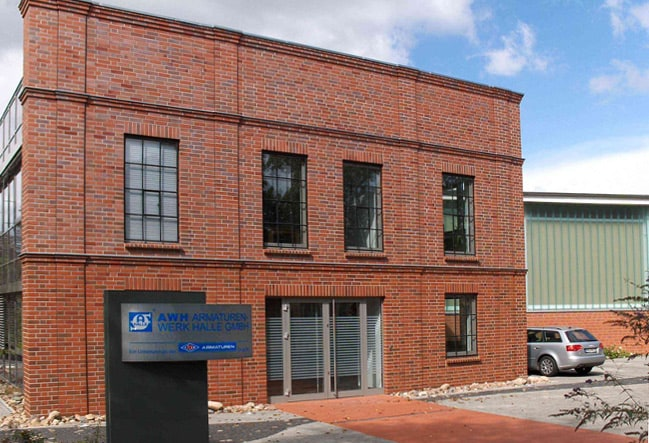 Халле (нем. Halle (Saale)), завод по производству конденсатоотводчиков AWH Armaturenwerk Halle GmbH.